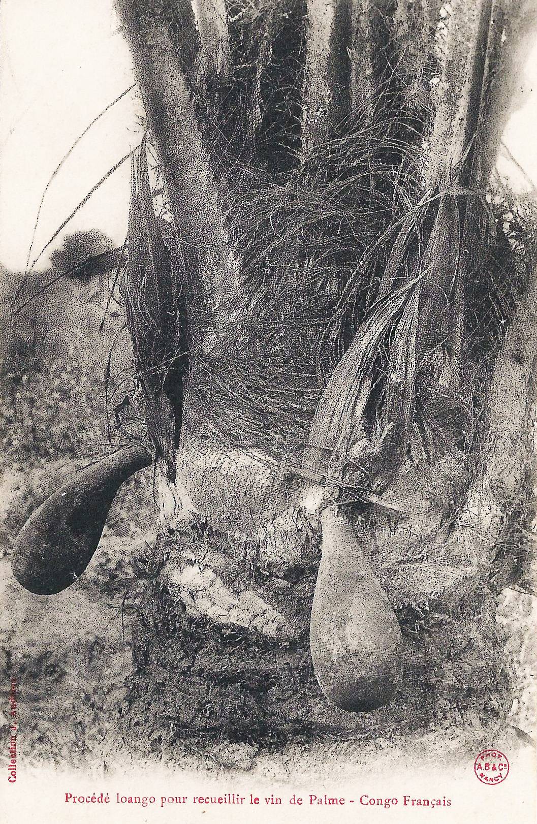 Procédé loango pour recueillir le vin de palme.. Collection J. Audema. Phot. A.B. & Cie, Nancy [Albert Bergeret] Congo Français